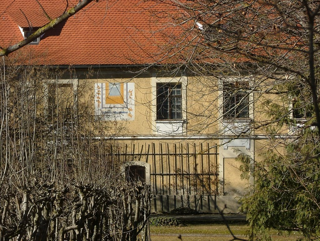 Ehemals Schloss